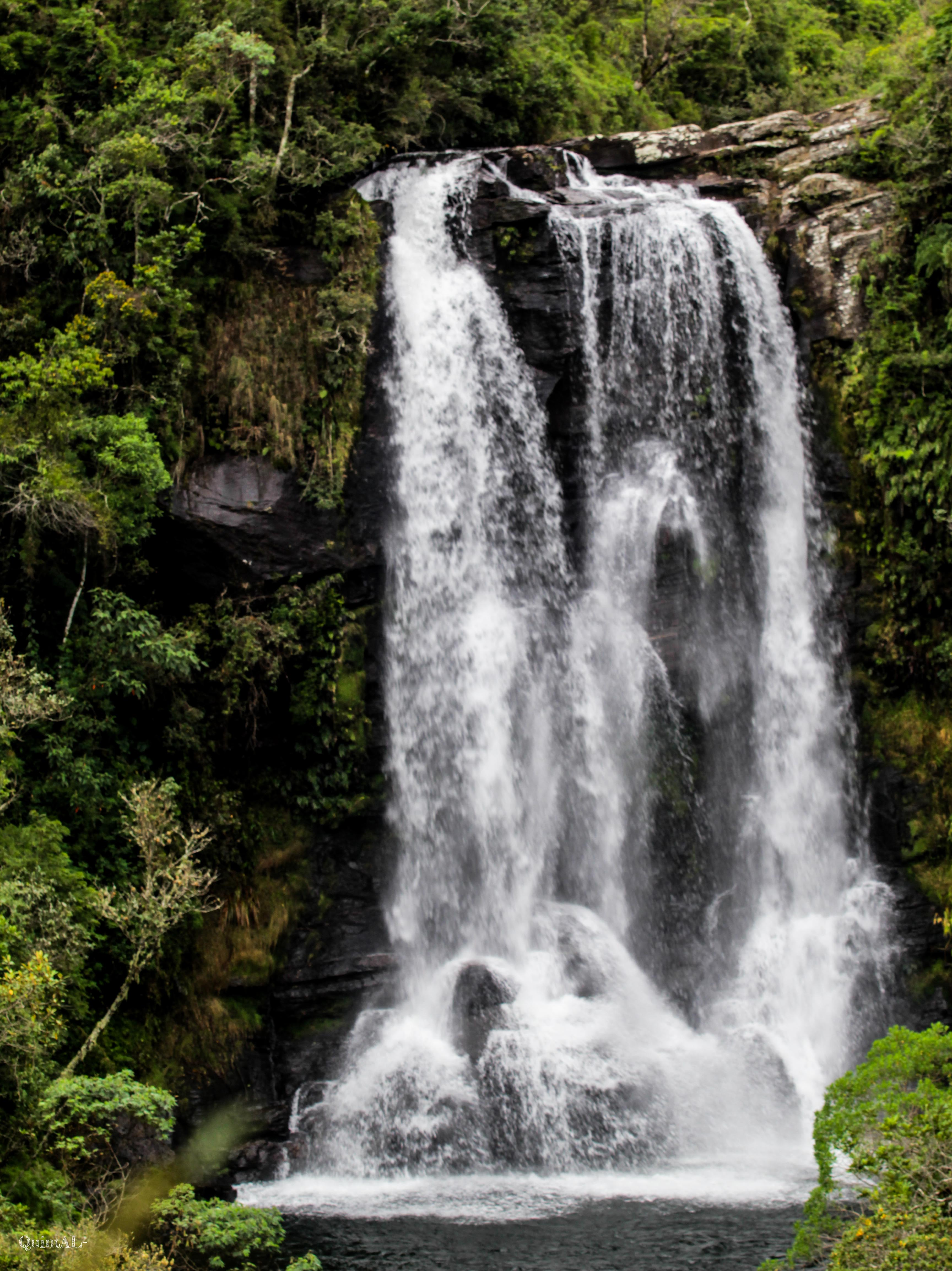 Ensaio sobre a natureza